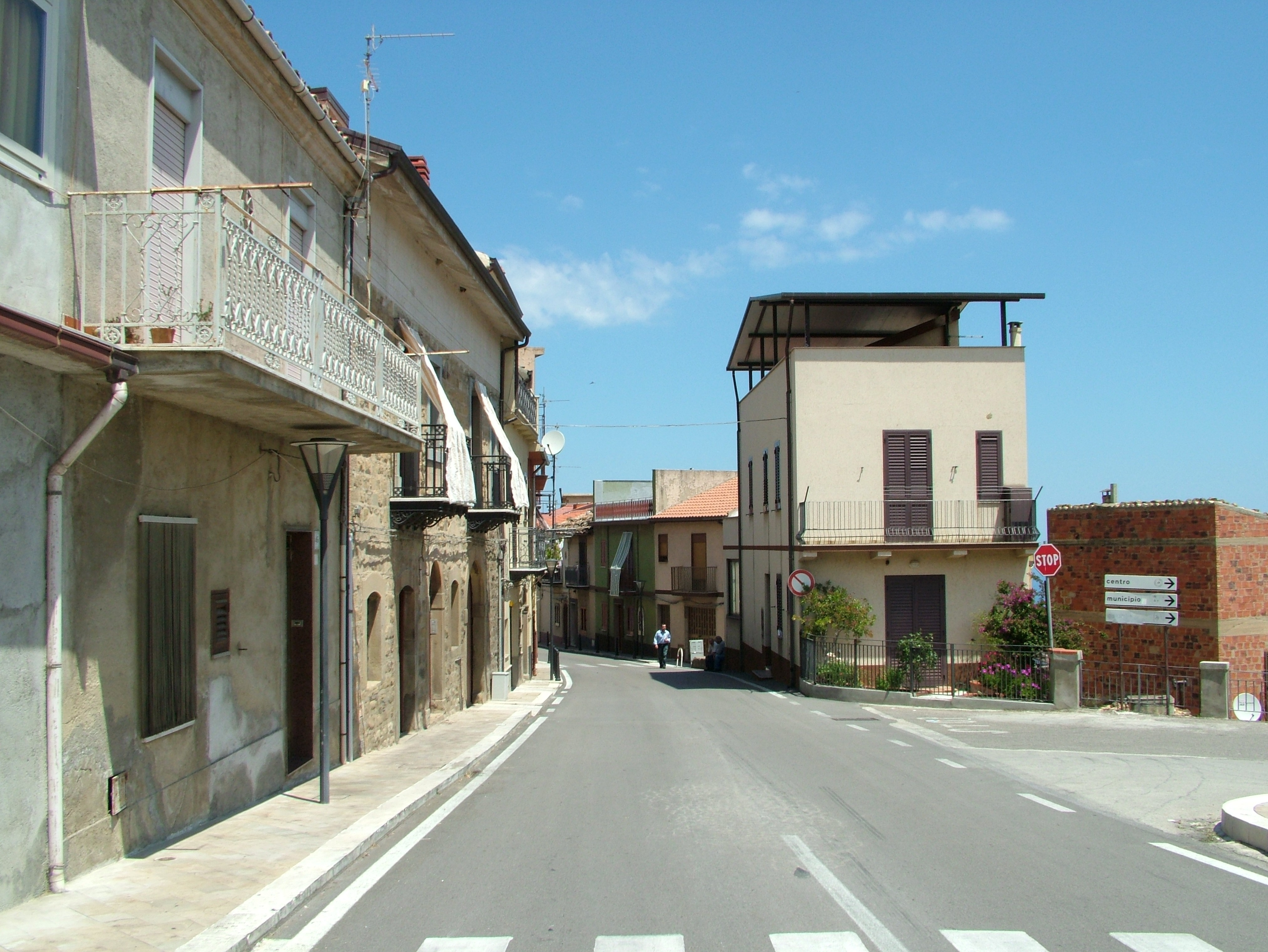 Reitano, Straße, Provinz Messina, Sizilien